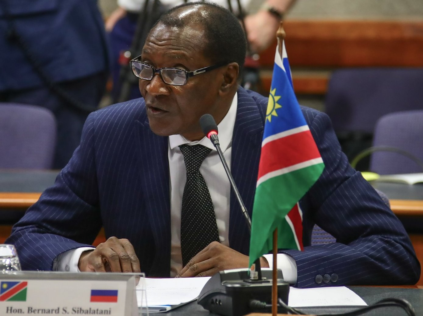 Сонга Бернард Сибалатани (род. 1953) — намибийский политик, председатель Национального совета Намибии.